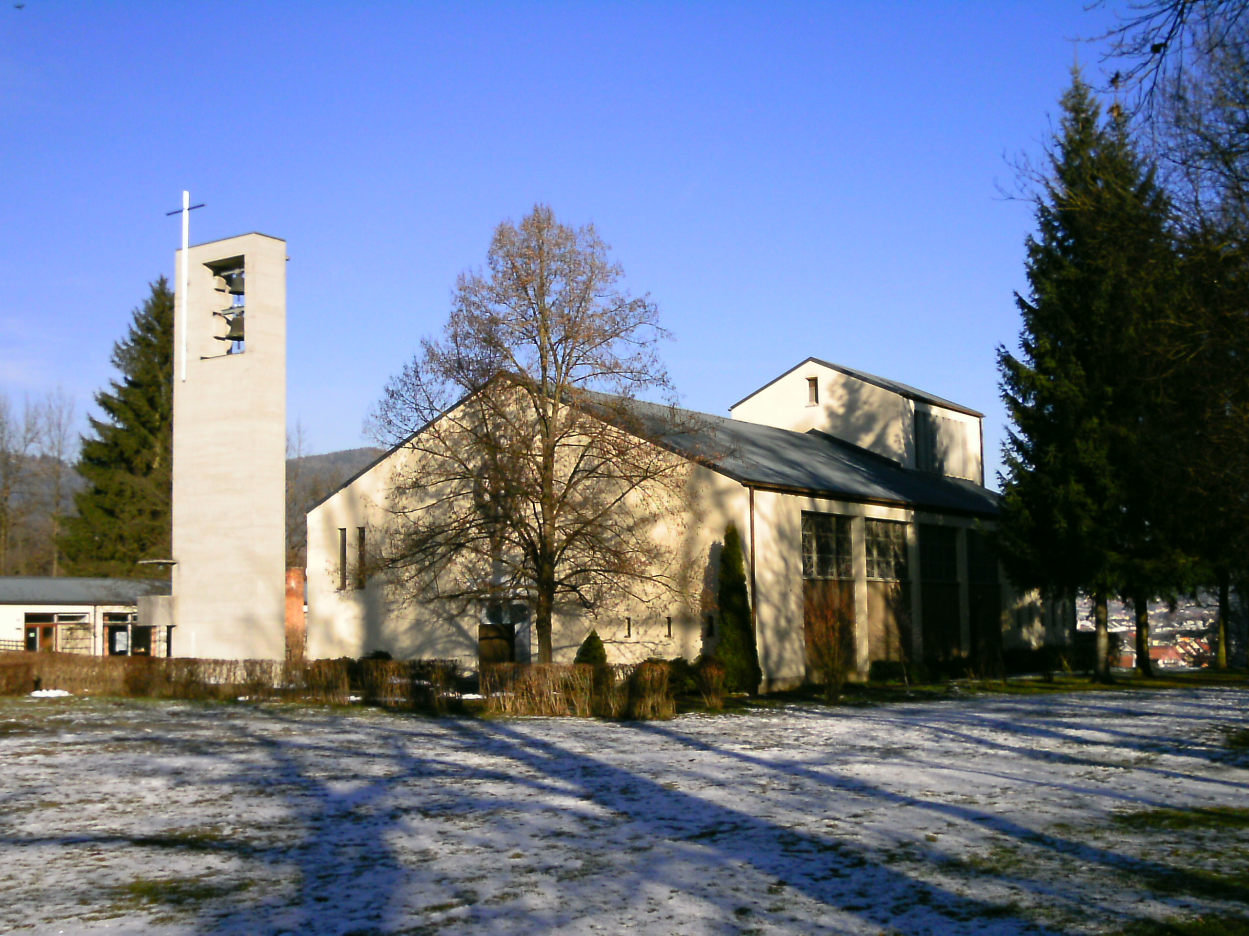 Pfarrkirche Ma.-Königin in Kapfenberg-Schirmitzbühel/Österreich.